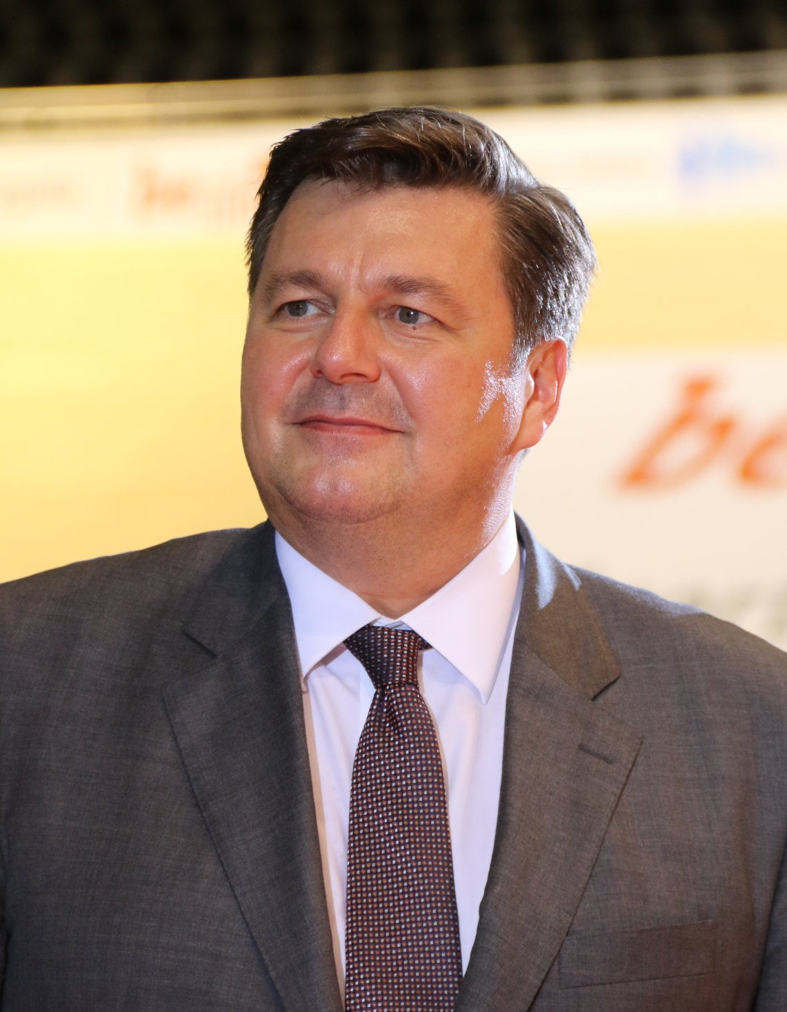 Andreas Geisel, Senator für Inneres und Sport von Berlin, bei der Eröffnung der UEC-Bahn-Europameisterschaften 2017 im Berliner Velodrom